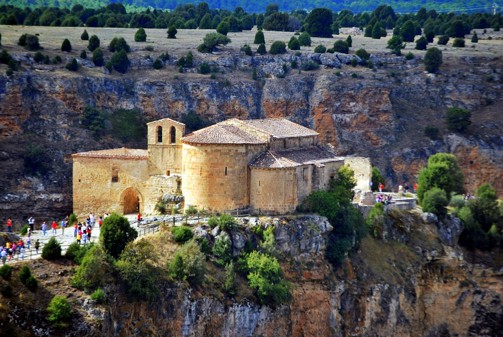 Ermita de San Frutos (Carrascal del Río, Spanien).